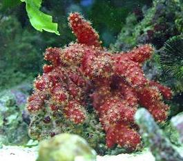 Nephthyigorgia en acuario de arrecife